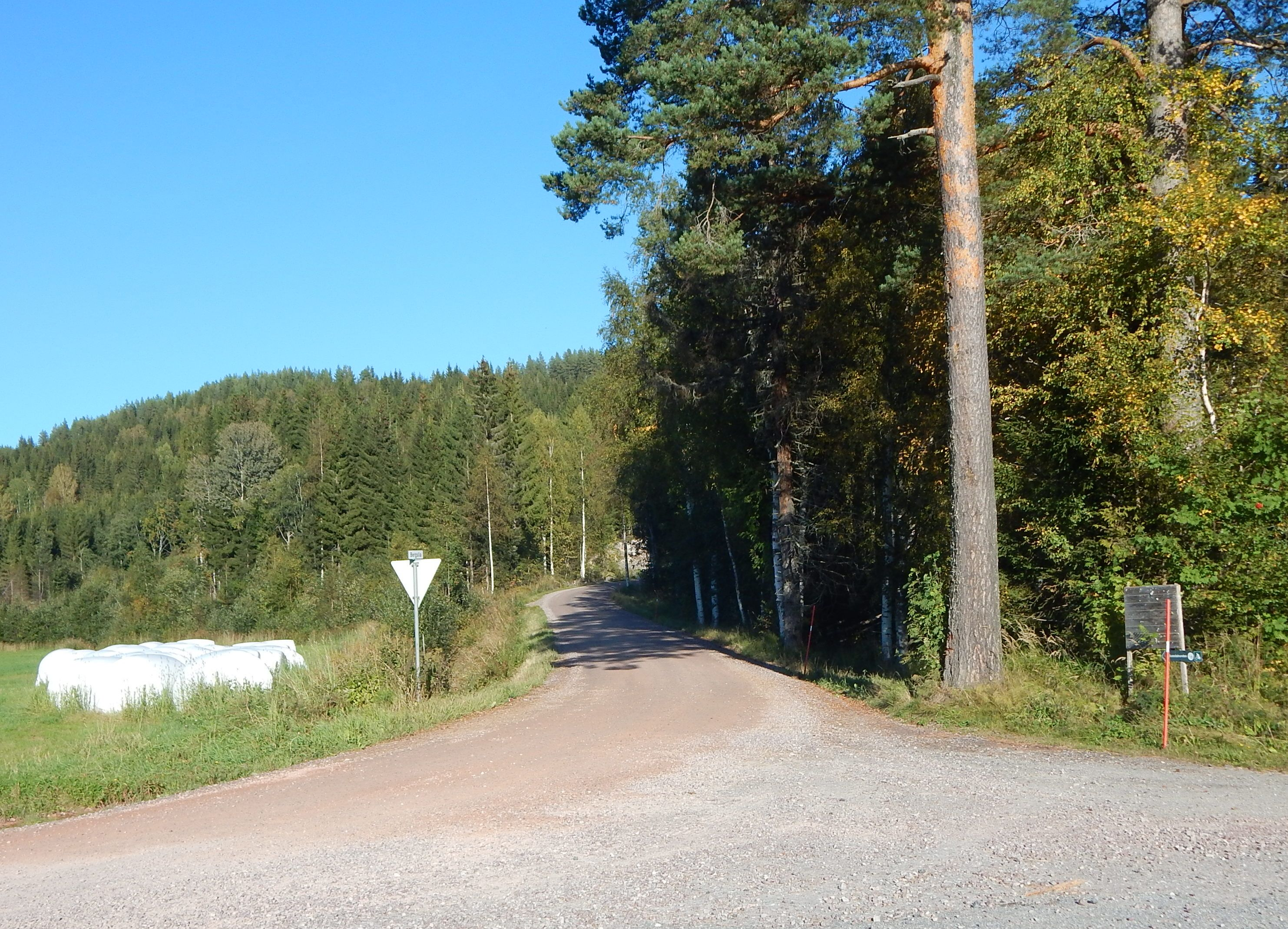 Bergslia (fylkesvei 604)